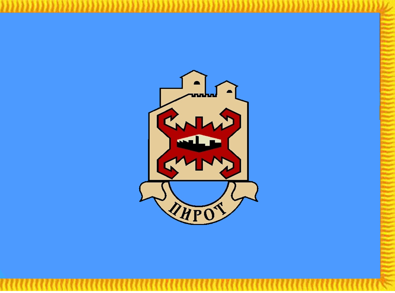 Flag of Pirot, Serbia/Drapeau de la ville de Pirot, Serbie